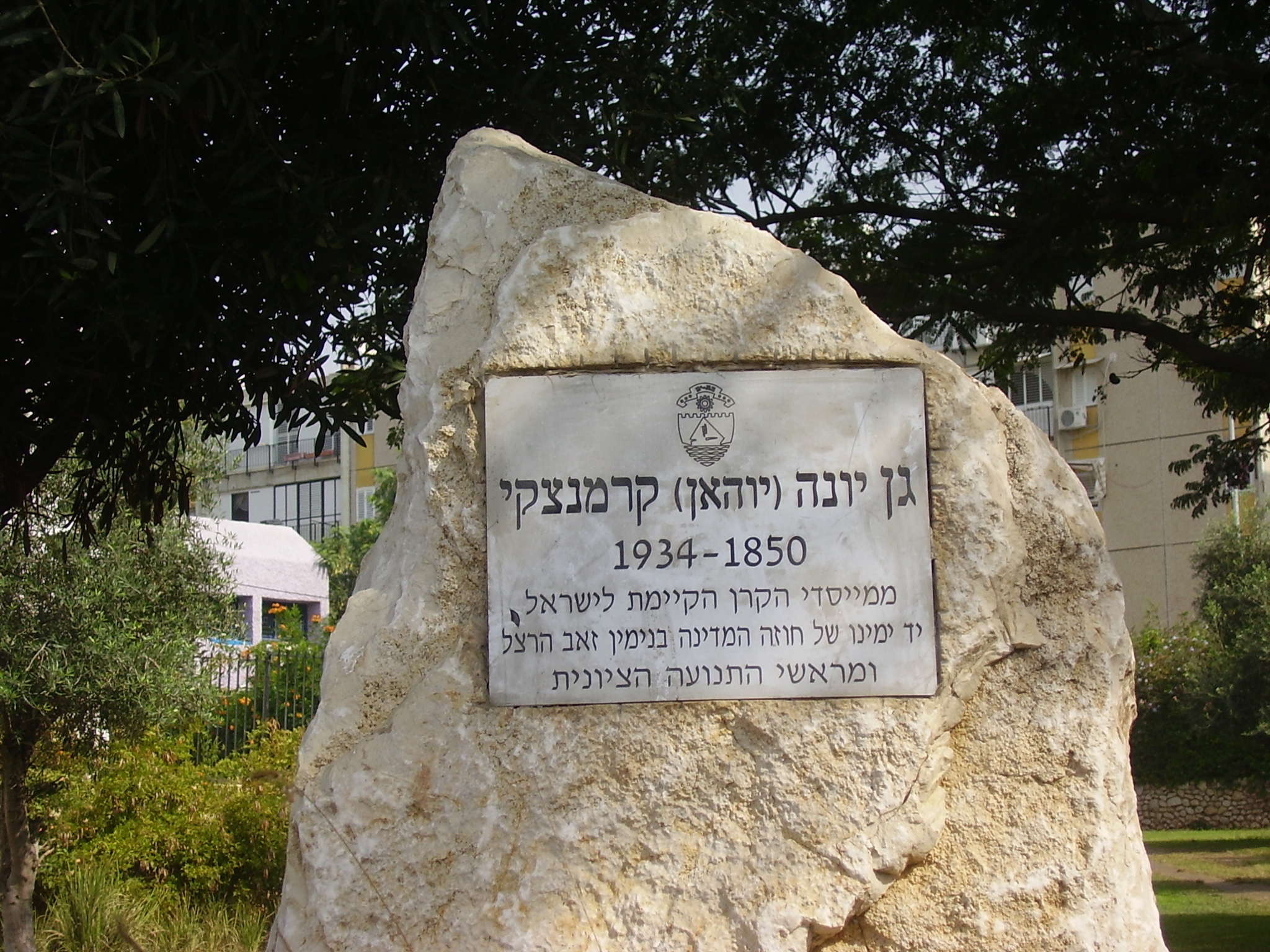 גן ע"ש יוהאן קרמנצקי בבת ים